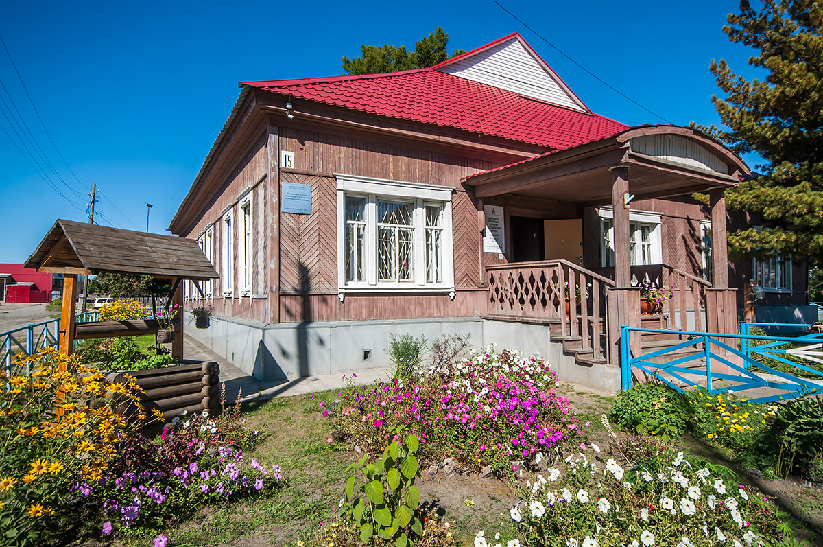 Дом жилой и контора управляющего Сузунским медеплавильным заводом: улица Ленина, 15, Сузун, Сузунский район, Новосибирская область